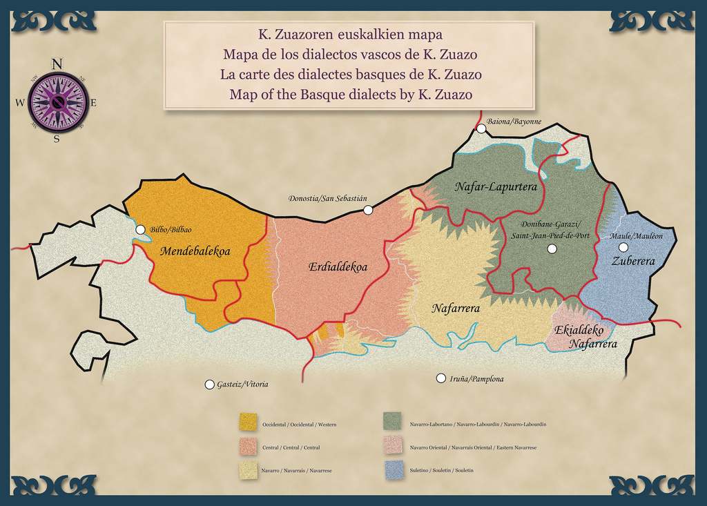 Koldo Zuazoren euskalkien mapa.